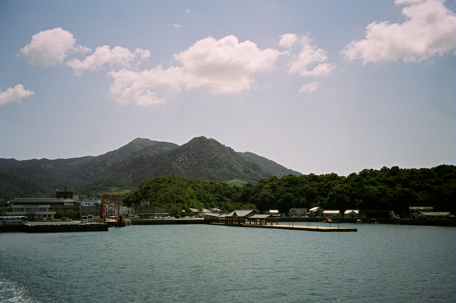 今治市大三島、宮浦港旅客桟橋。